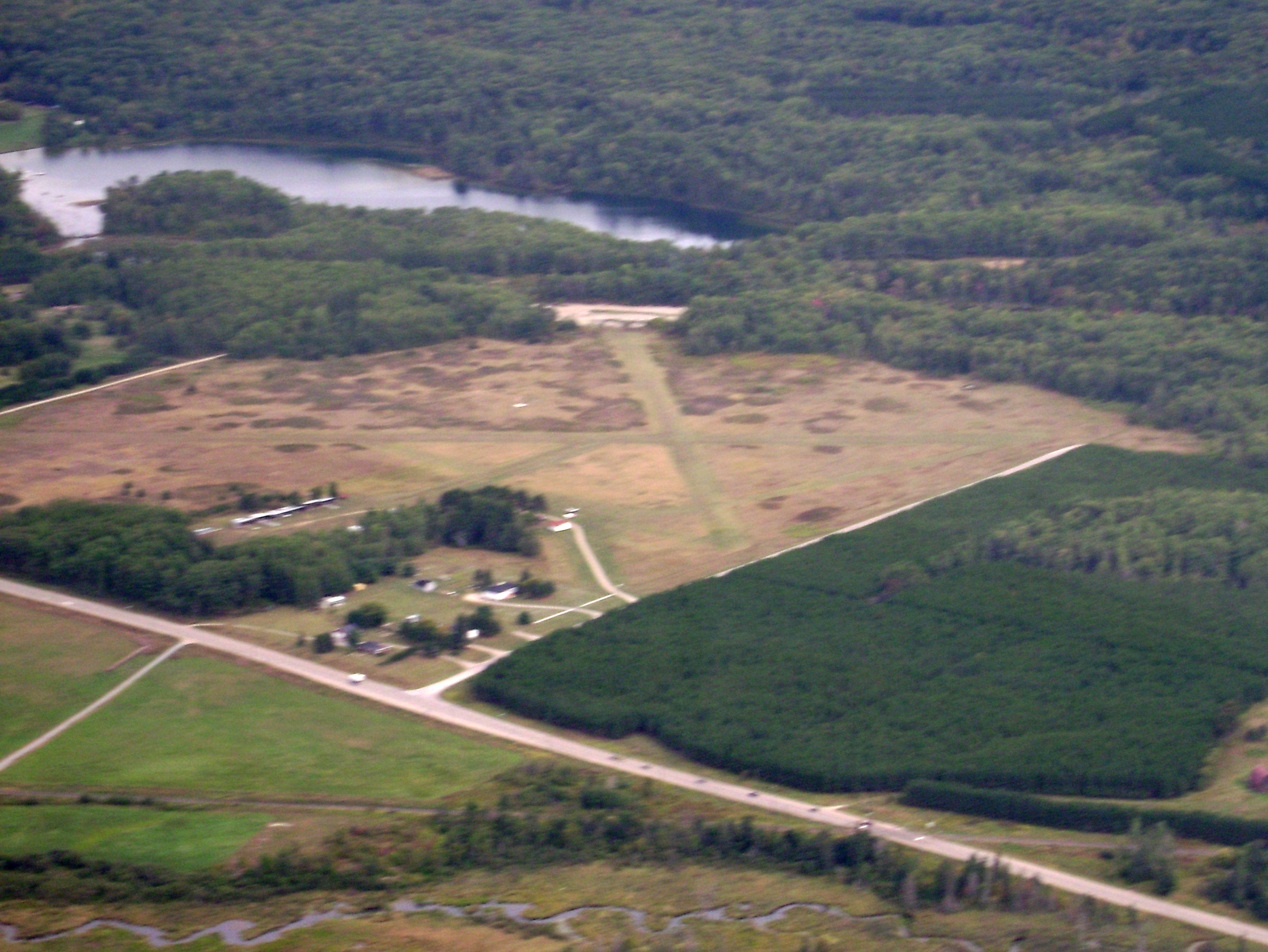 Cobden/Bruce McPhail Airport, Cobden, Ontario, Canada